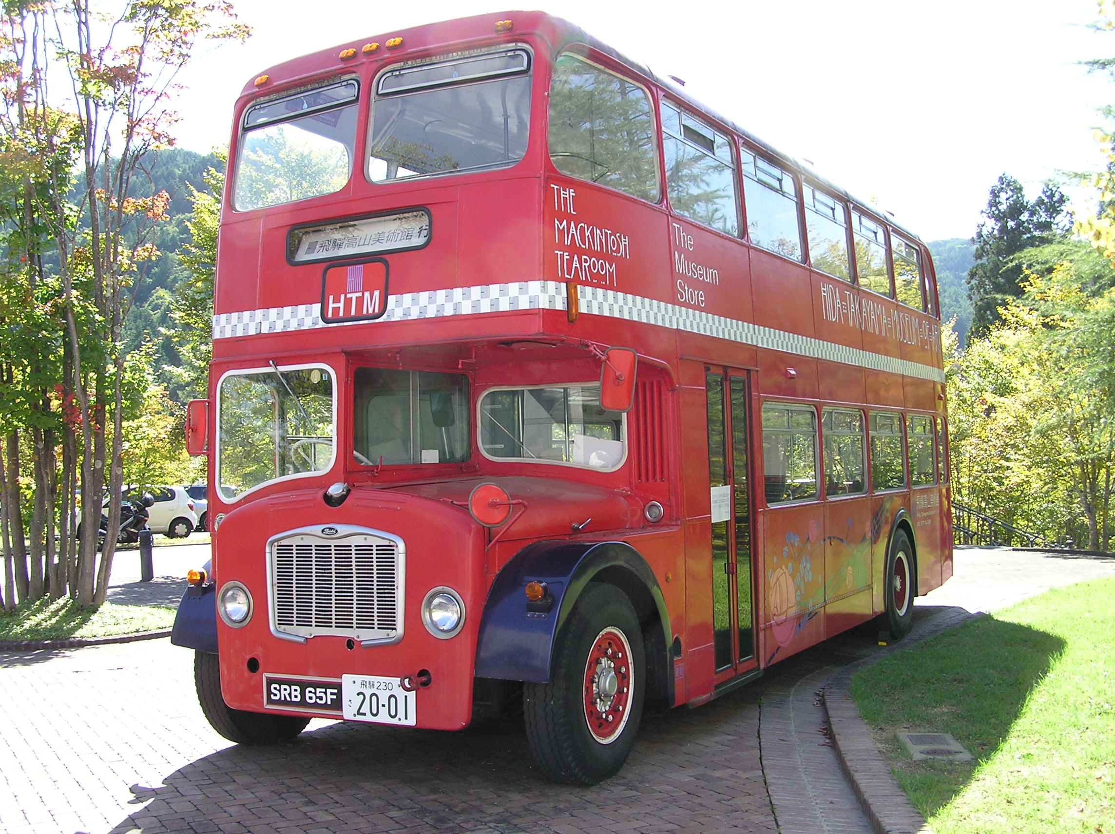 ブリストル・ロデッカ（岐阜県・飛騨高山美術館）